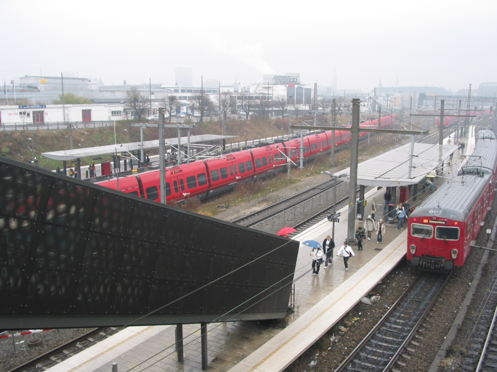 Dybbølsbro Station i København